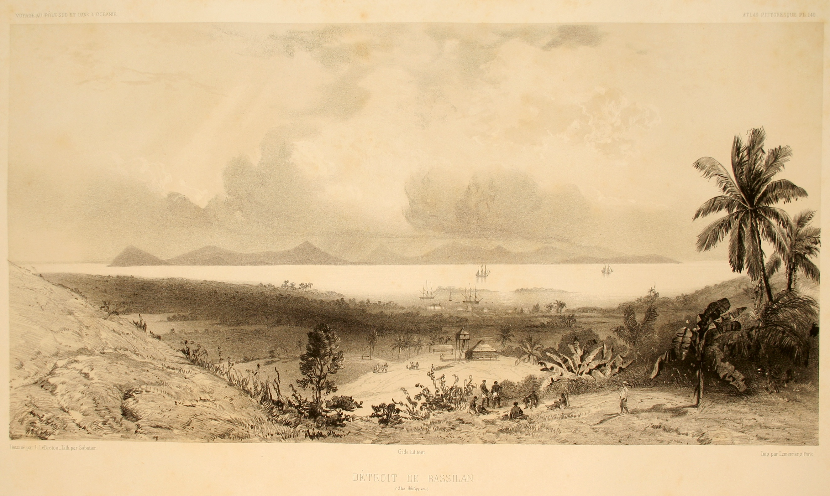 Detroit de Bassilan. Atlas pittoresque, planche 140.